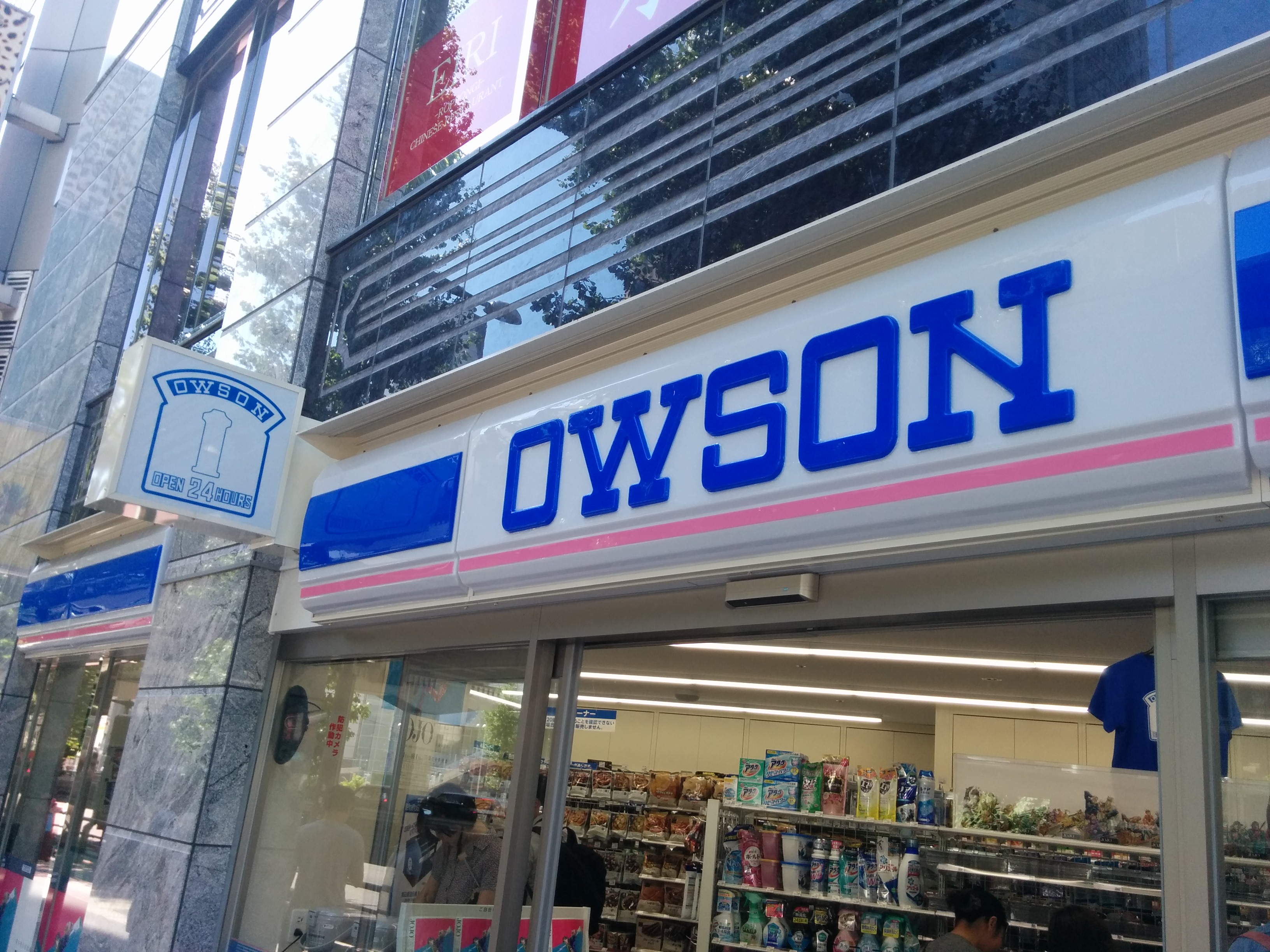 Temporaire, c'est une référence au manga JOJO dans lequel cette chaine apparait, lui-même copié depuis la chaine rélle LAWSON. Ce magasin est en fait un LAWSON presque normal.